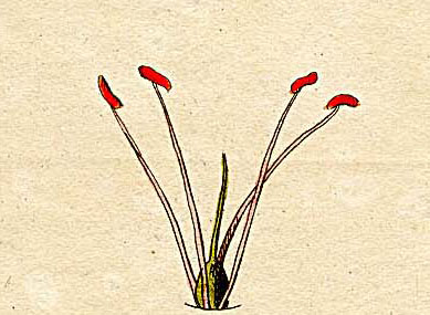 Ausschnitt (Klasse IV) aus Ehrets Tafel "Methodus Plantarum Sexualis"